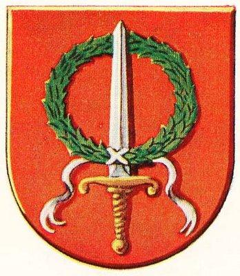 Official Coat of Arms Batavia (Netherlands-Indies)